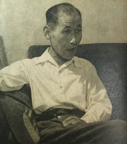 稲田正純